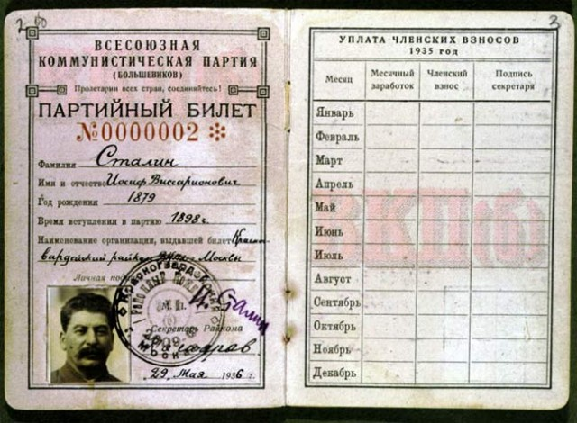 Сталин Иосиф Виссарионович, партийный билет